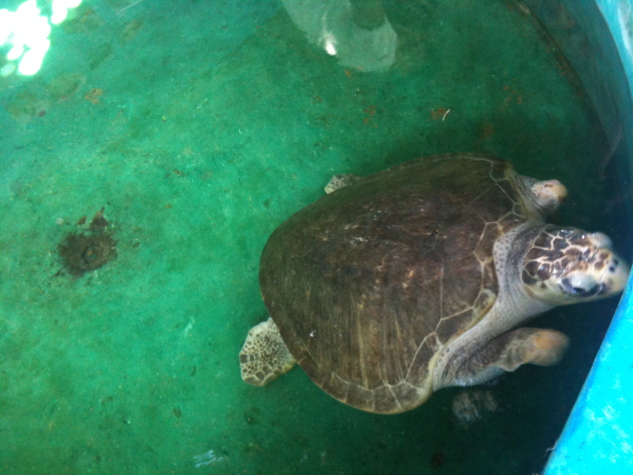 En Boca del Cielo se preocupan por preservas especies como ésta